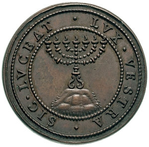 מנורת המקדש שנמצא בוותיקן מטבע שהופק ע"י הוותיקן בשנת 1590 לרגל מינויו של אורבנוס השביעי Pope Urban VII